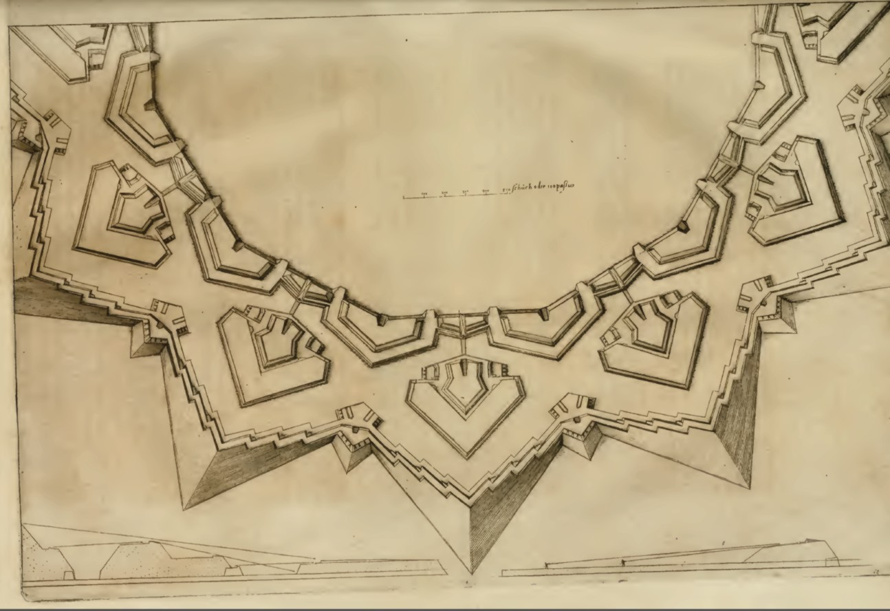 Daniel Specklin Errichtung von Ravelinen